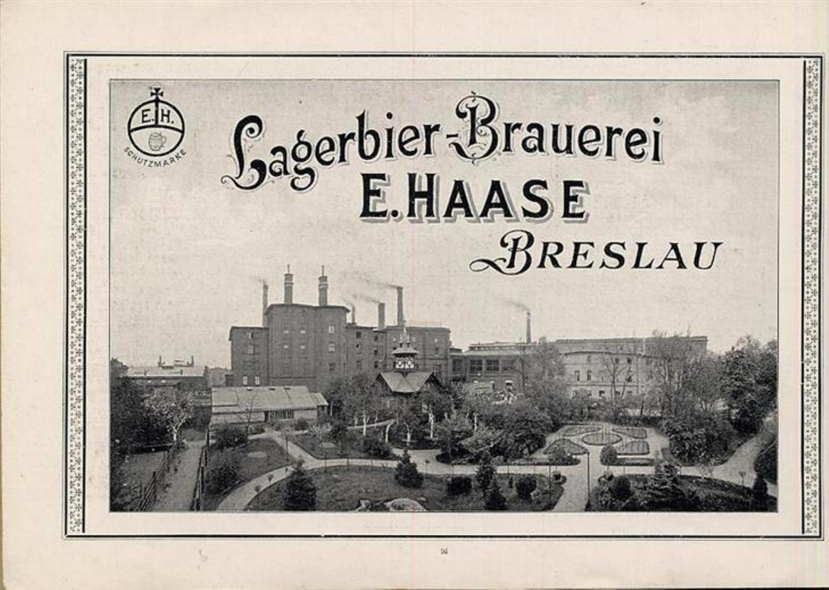 Browar Haase Przedmieście Oławskie / ul. Krakowska 90-116